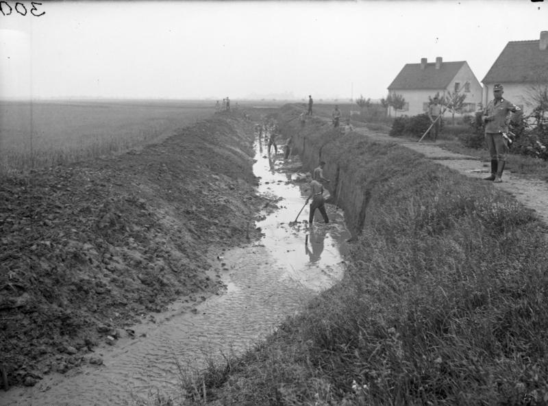 Worms, Kultivierungsarbeiten durch den RAD Reichsarbeitsdienst. Kultivierungsarbeiten, Schaufeln eines Grabens unter Aufsicht.